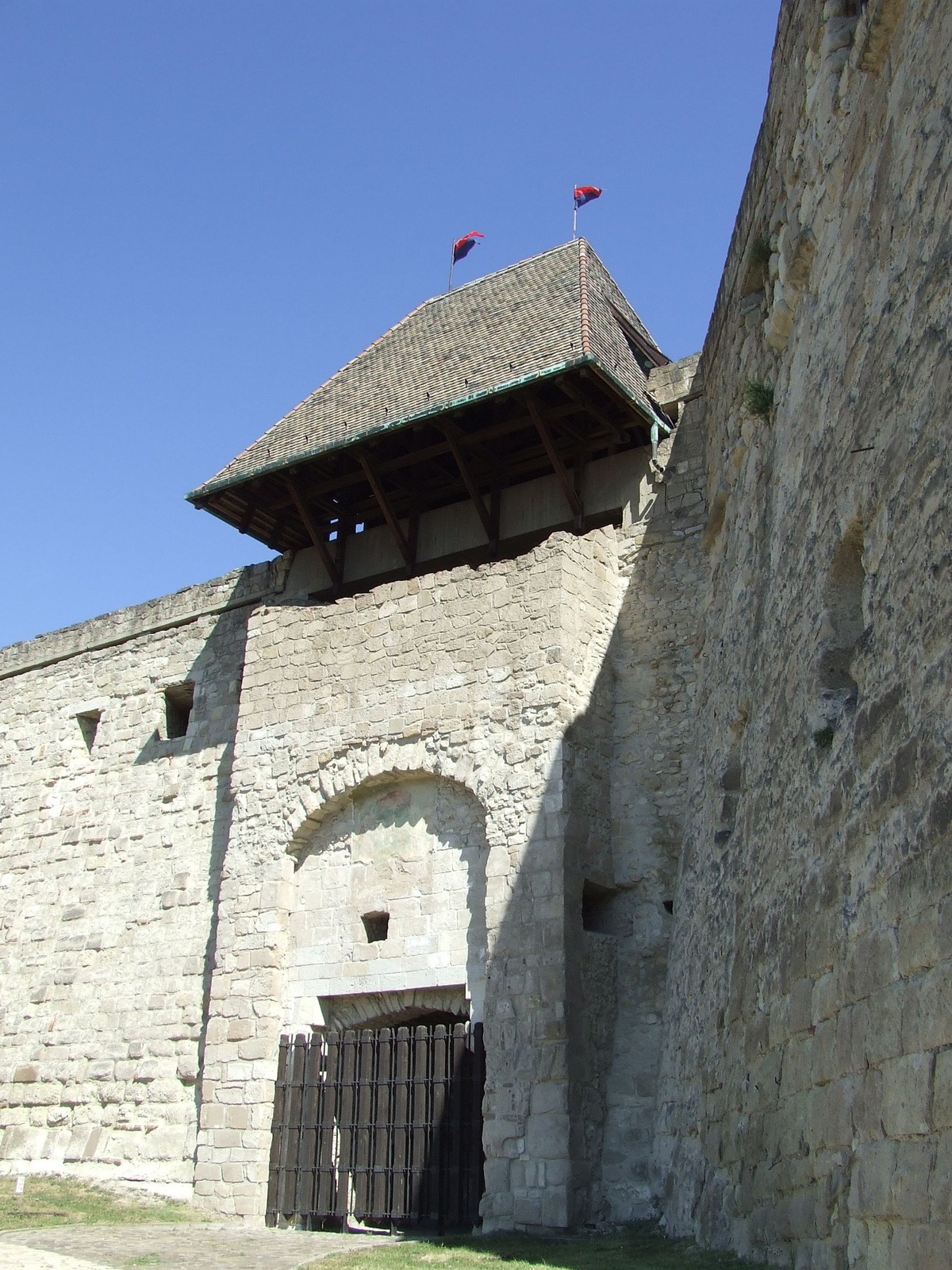 Erődrendszer romjai (Eger, Szervita utca, Dobó István utca, Bástya utca, Vécsey Sándor utca) This is a photo of a monument in Hungary. Identifier: 17237